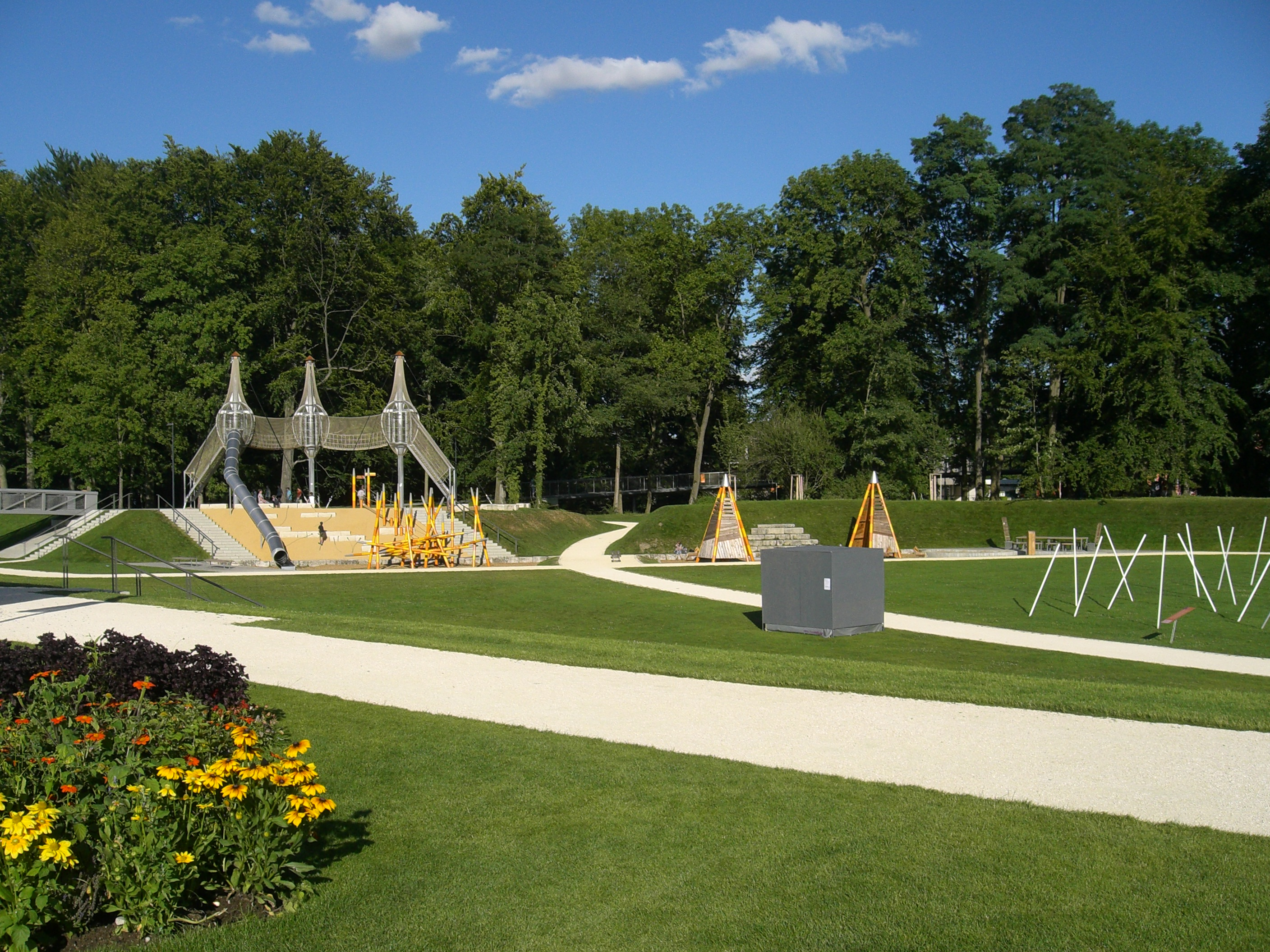 Landesgartenschau in Neu-Ulm